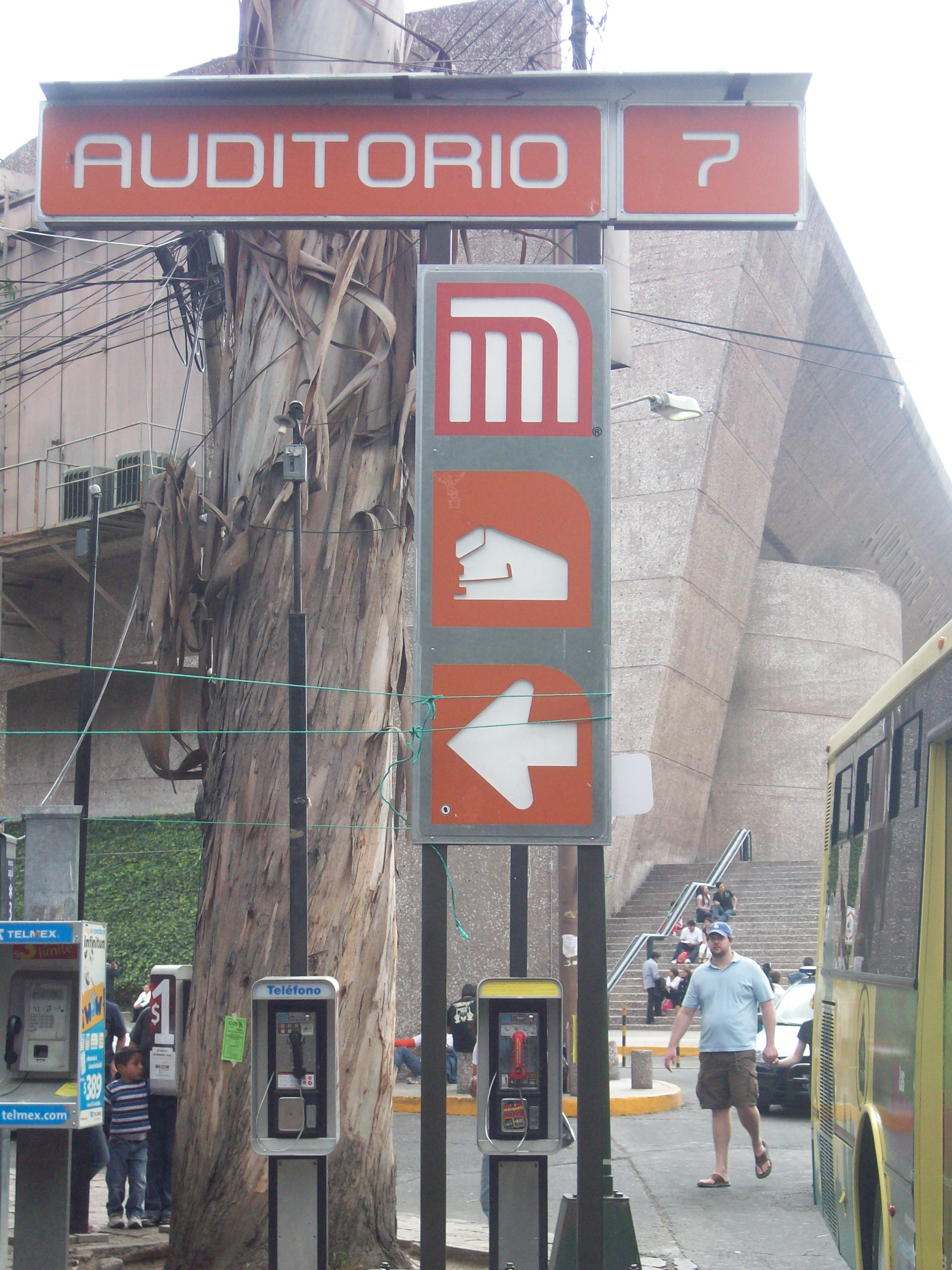 Edificio de la estación Auditorio